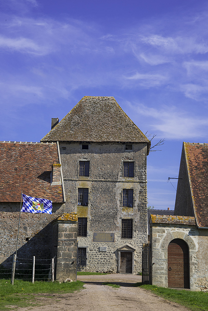 Tour Vauban .